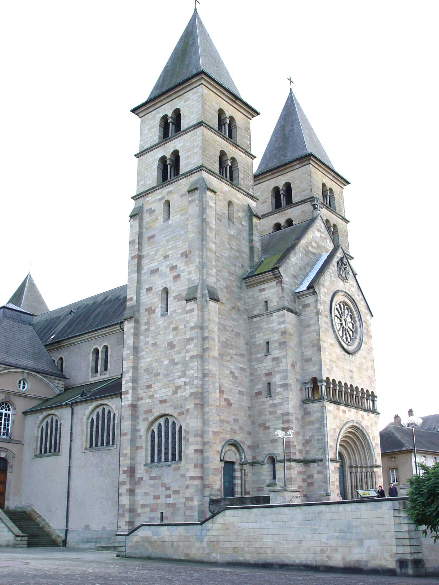 Basilika Iechternach. Kategorie:Gemeng Iechternach